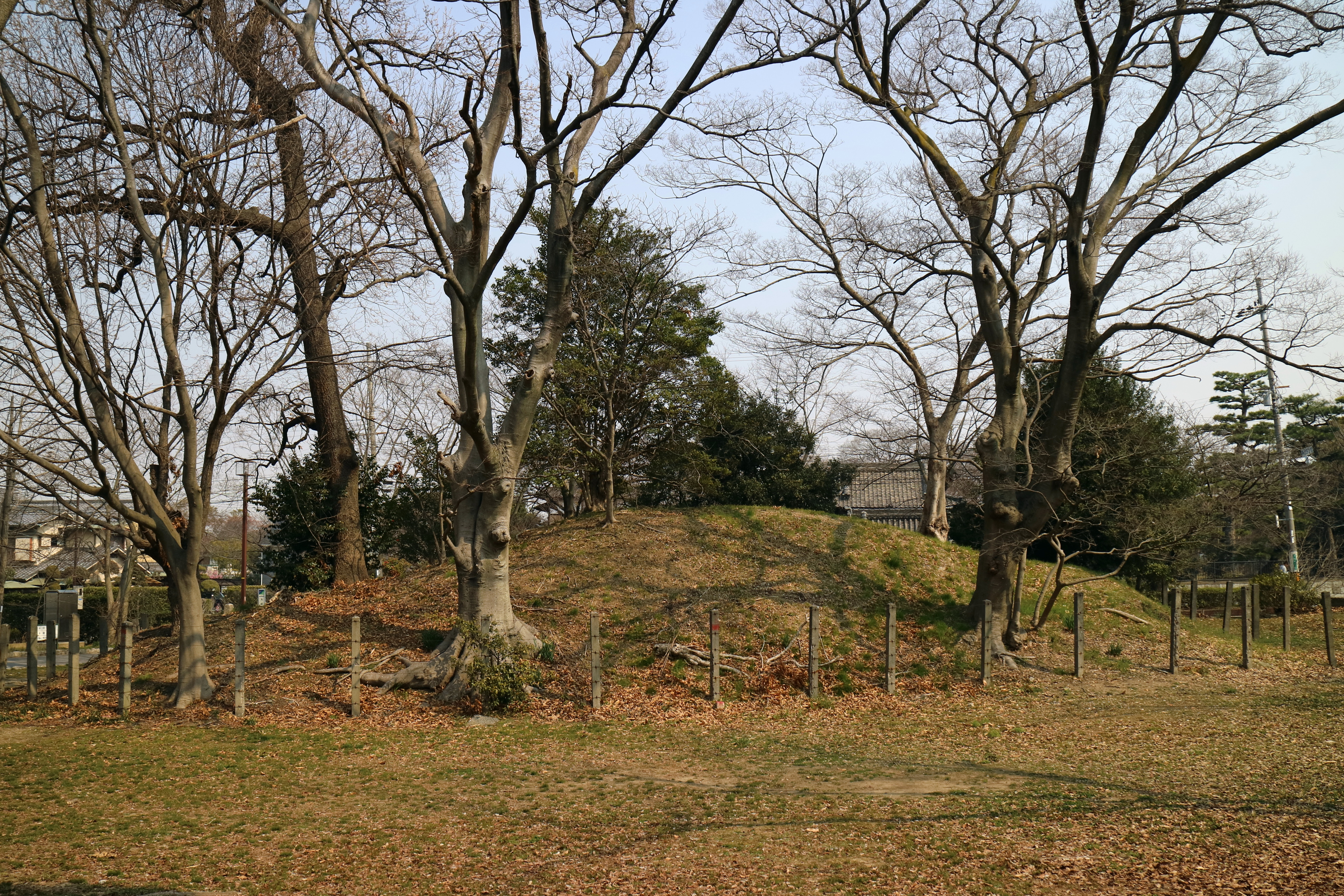 孫太夫山古墳